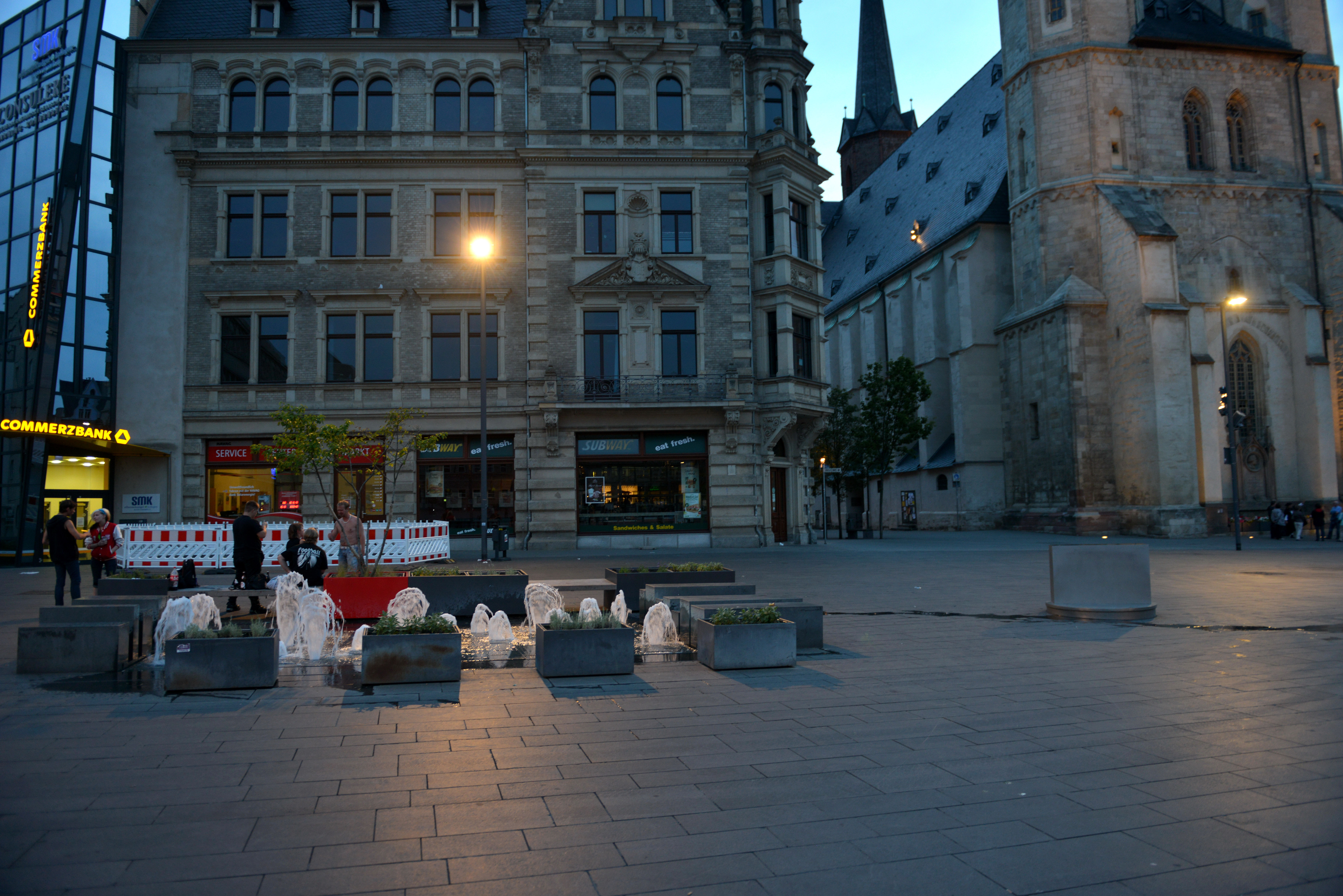 Ostseite des Marktplatzes in der Altstadt von Halle/Saale, am Ausgang zur Straße An der Marienkirche, in der Abenddämmerung. Links der Goldsole-Brunnen, rechts daneben das „Geoskop“. The making of this document was supported by the Community-Budget of Wikimedia Germany.